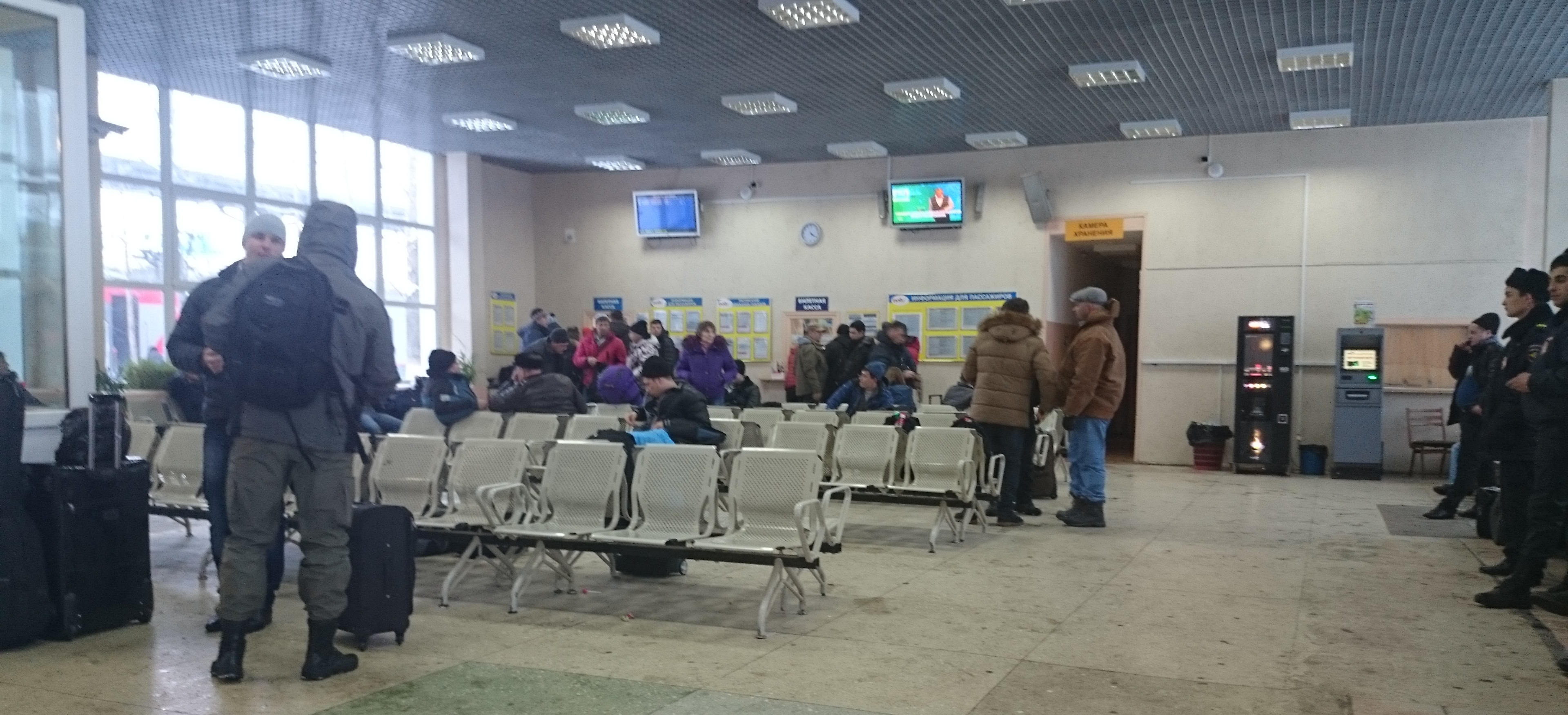 Nogliki train station